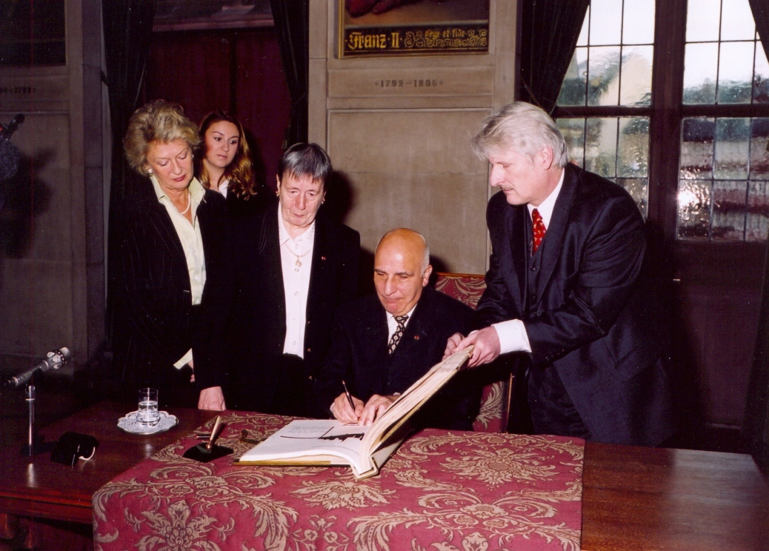 Anni und Keyvan Dahesch bei der Eintragung ins Goldene Stiftungsbuch der Stadt Frankfurt am Main am 3. Dezember 2006. Ganz links: Petra Roth, damals Oberbürgermeisterin der Stadt Frankfurt am Main; rechts: Karlheinz Voß, Chef des Protokolls der Stadt